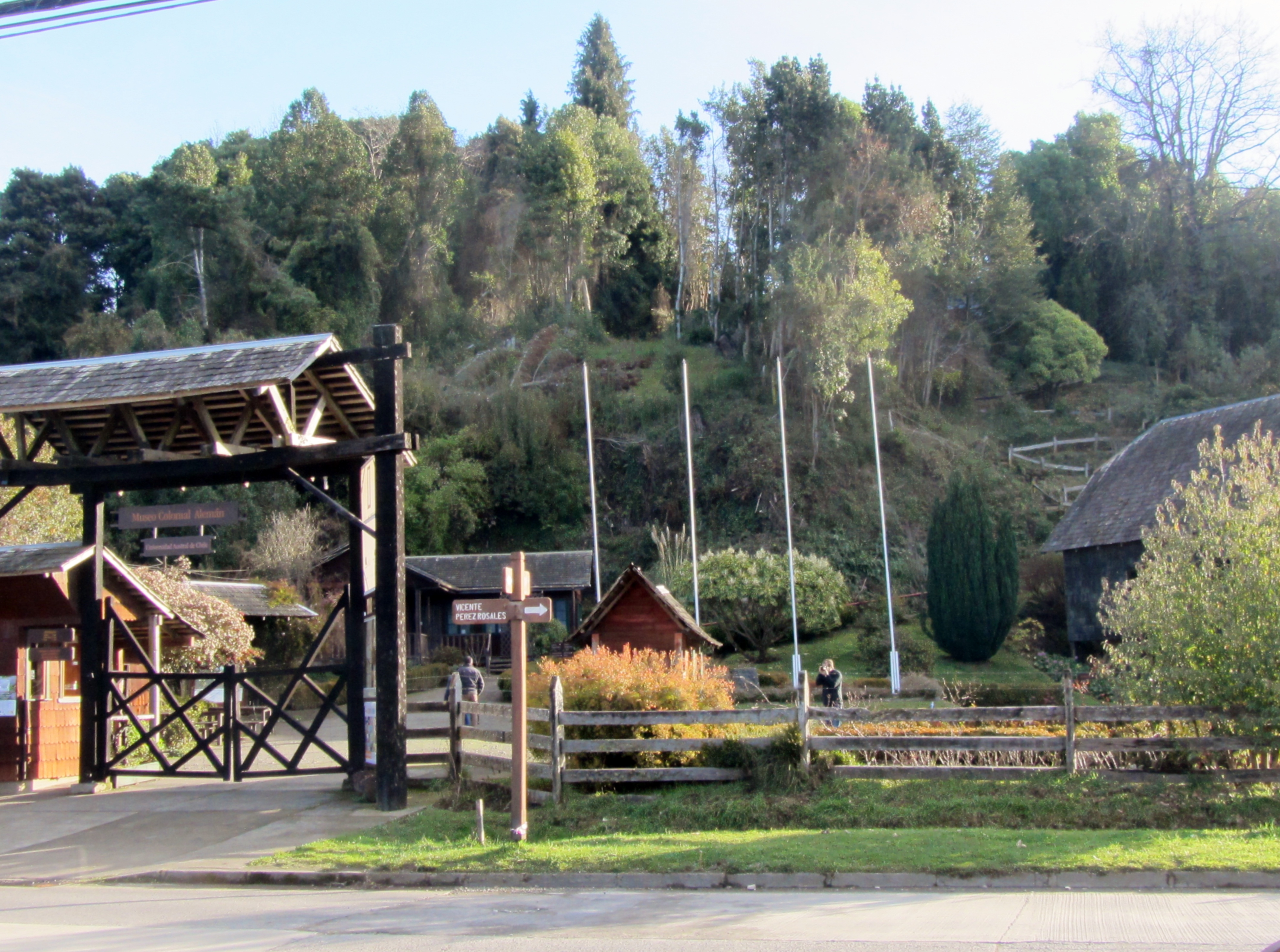 Entrada al Museo Colonial Alemán de Frutillar, Chile.